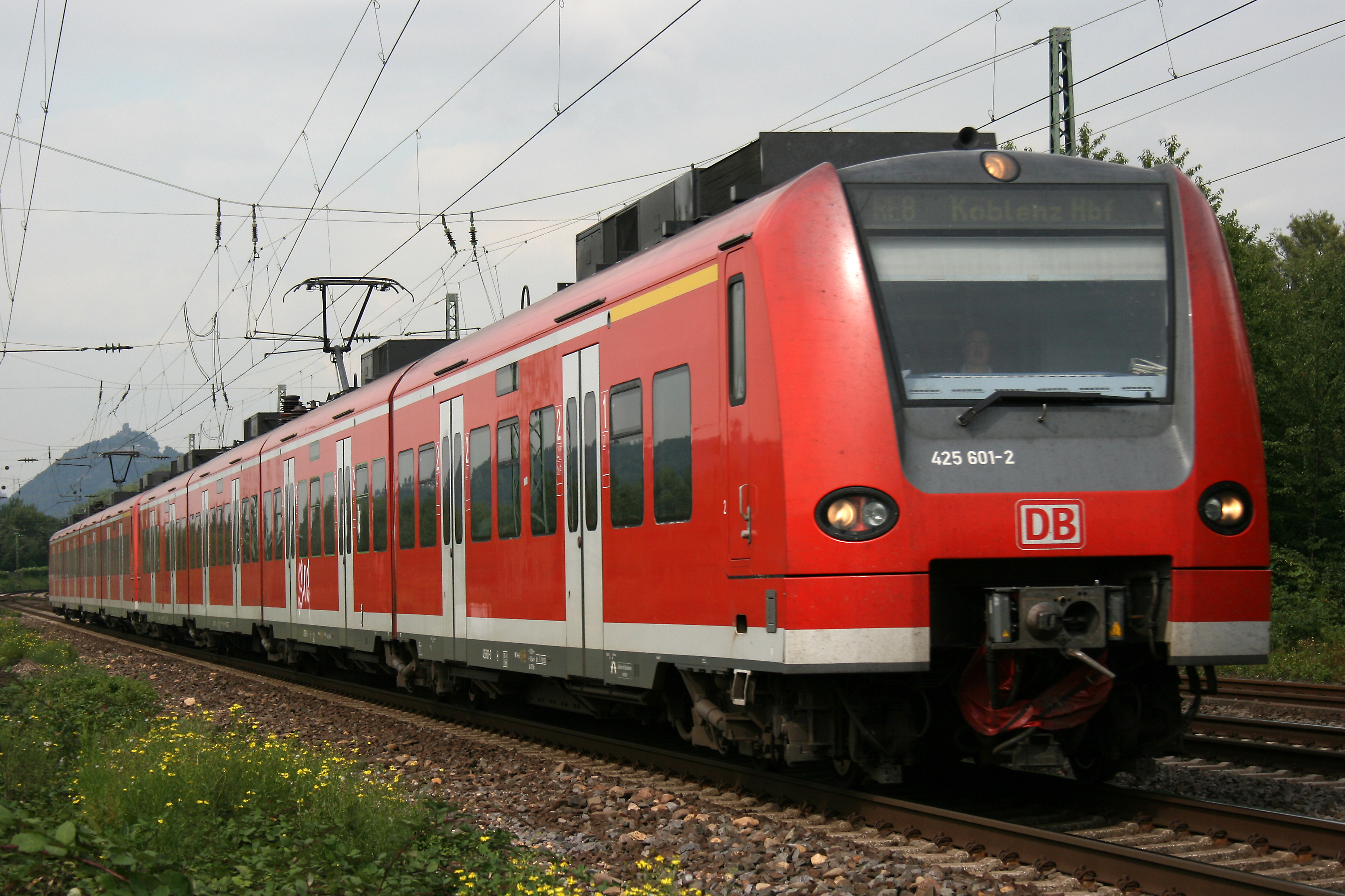 Elektrotriebwagen der Baureihe 425 bei Unkel